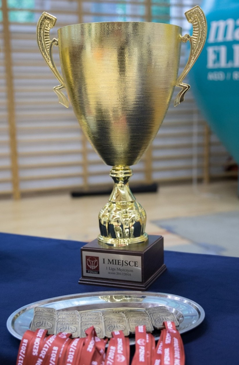 Puchar, medale za I miejsce dla Spójni (17.05.2018)